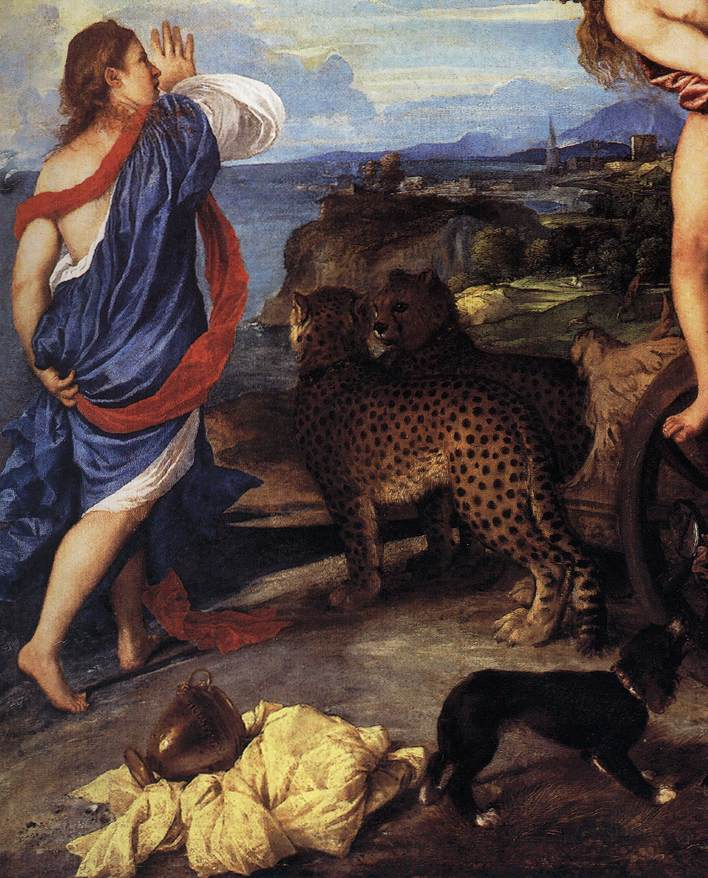 detail